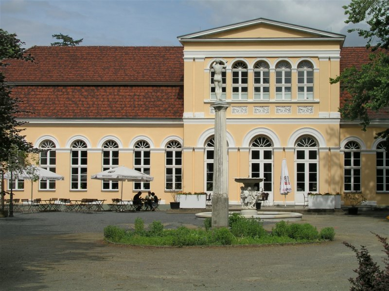 Orangerie Neustrelitz 2007